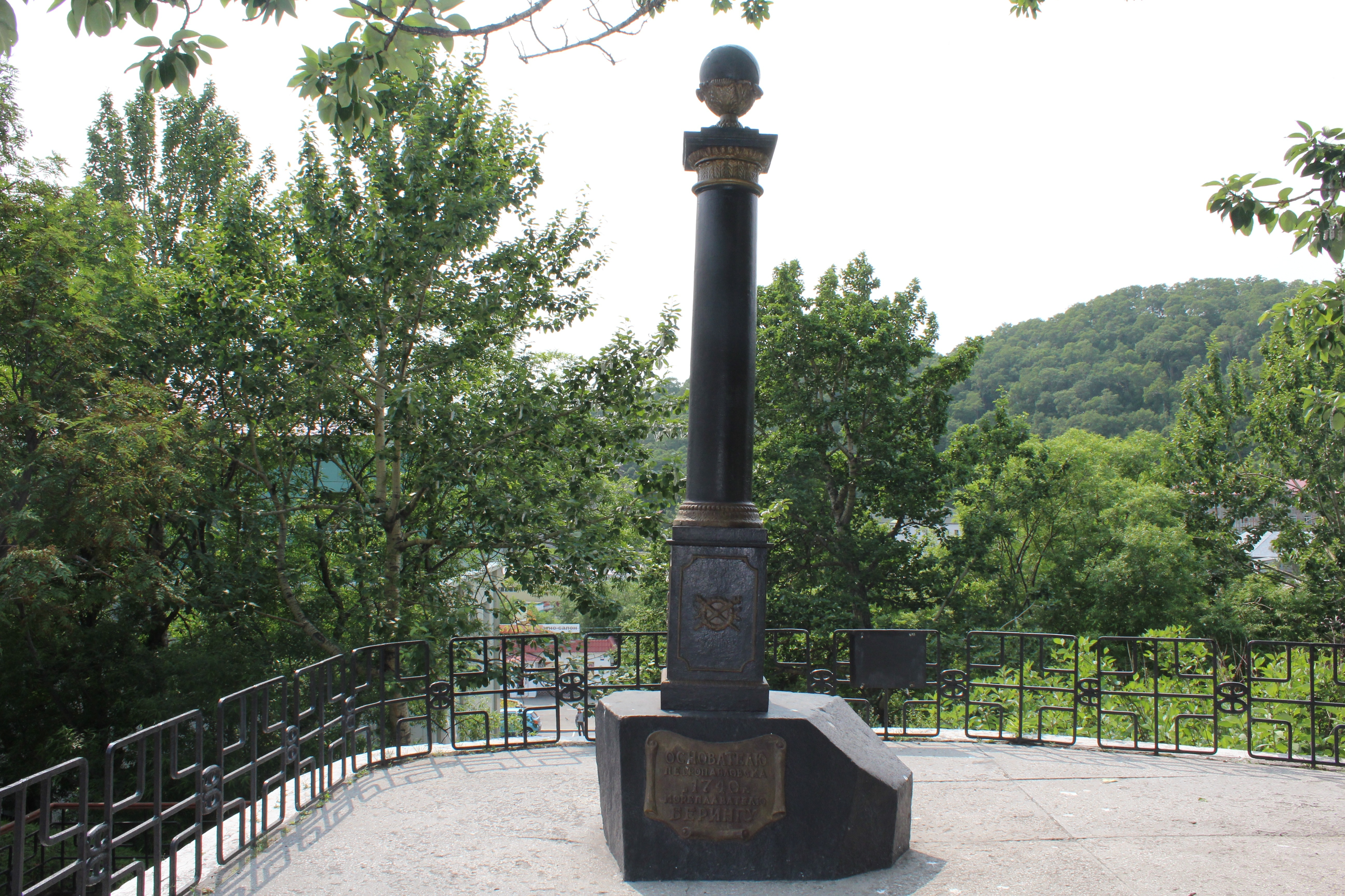 Памятник Витусу Берингу в Петропавловске-Камчатском